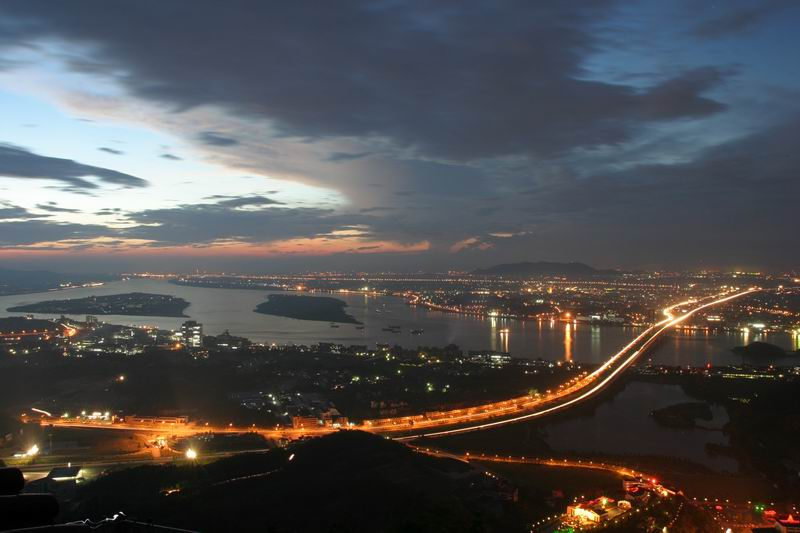 西江夜景